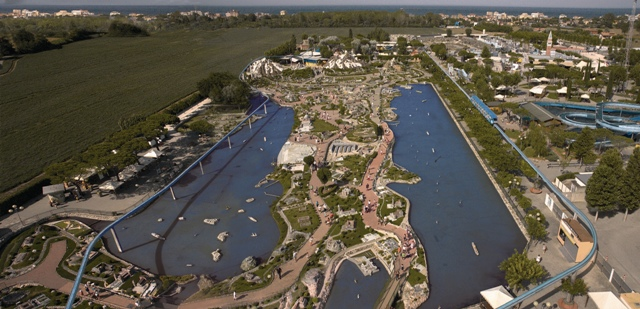 Panoramica